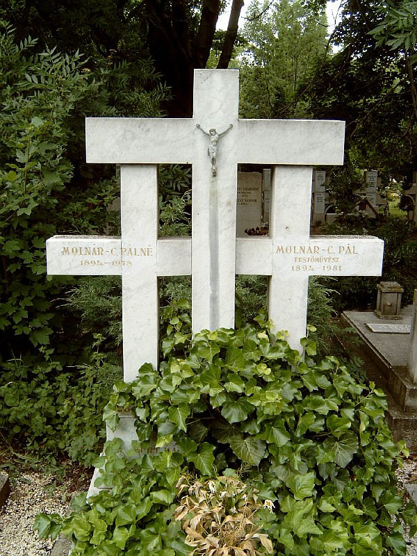 Molnár C. Pál és feleségének, Gstettner Alicenek sírja Budapesten. Farkasréti temető: 34/2-2-41